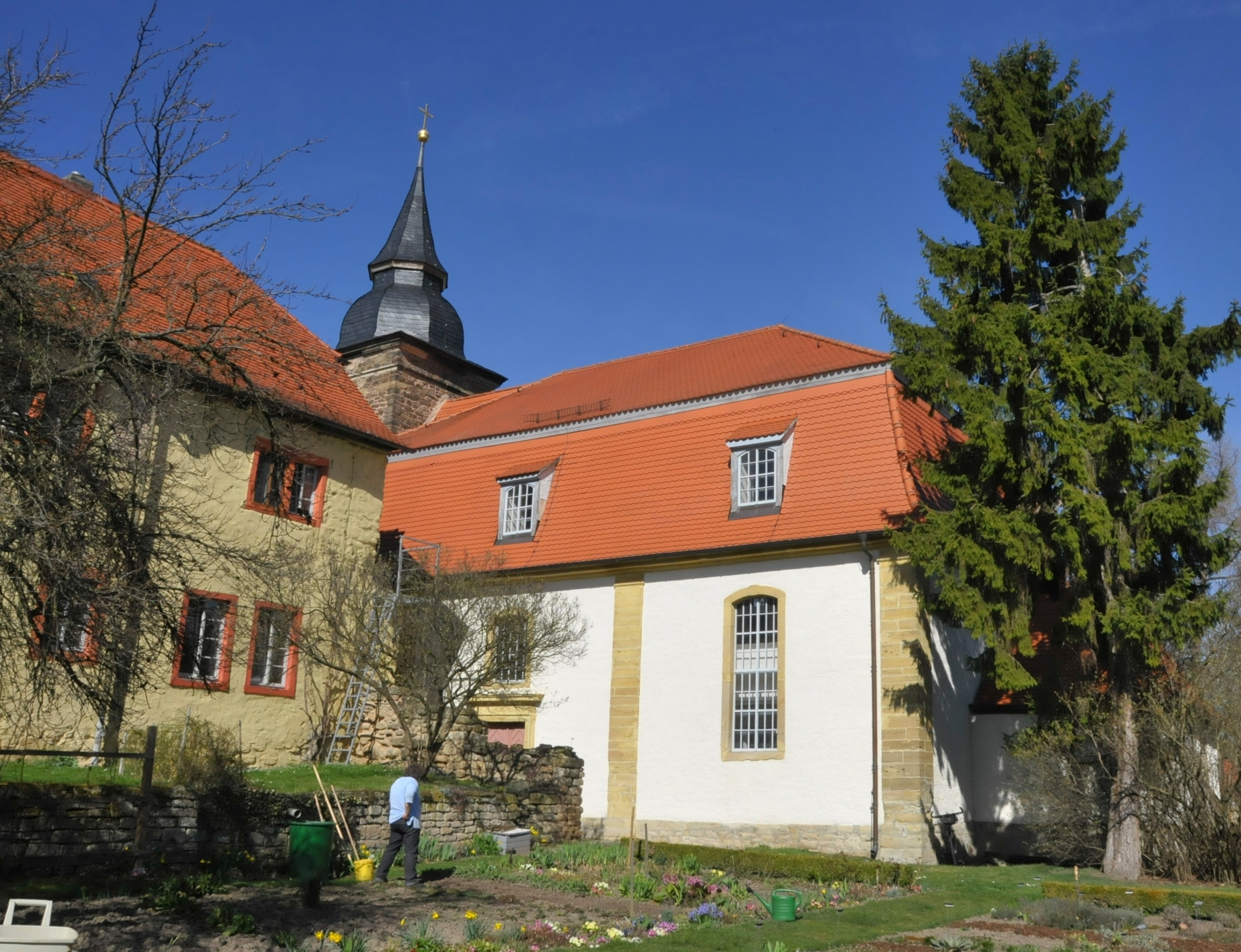 Klosterkirche Donndorf, Südwestansicht